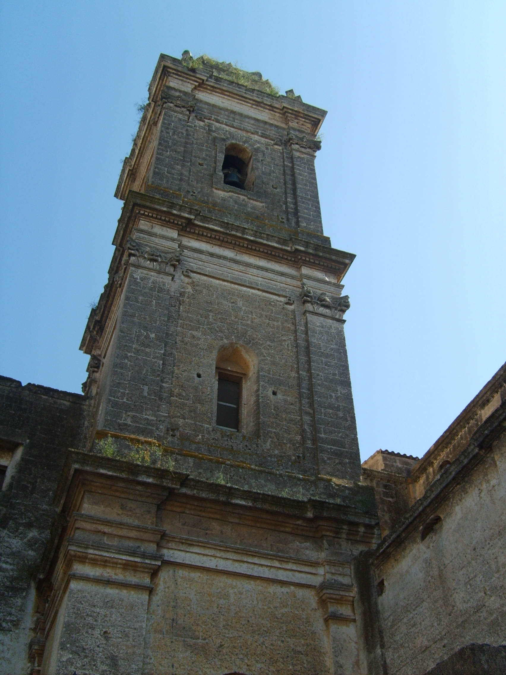 Campanile del Santuario di Santa Maria della Croce visto dal basso